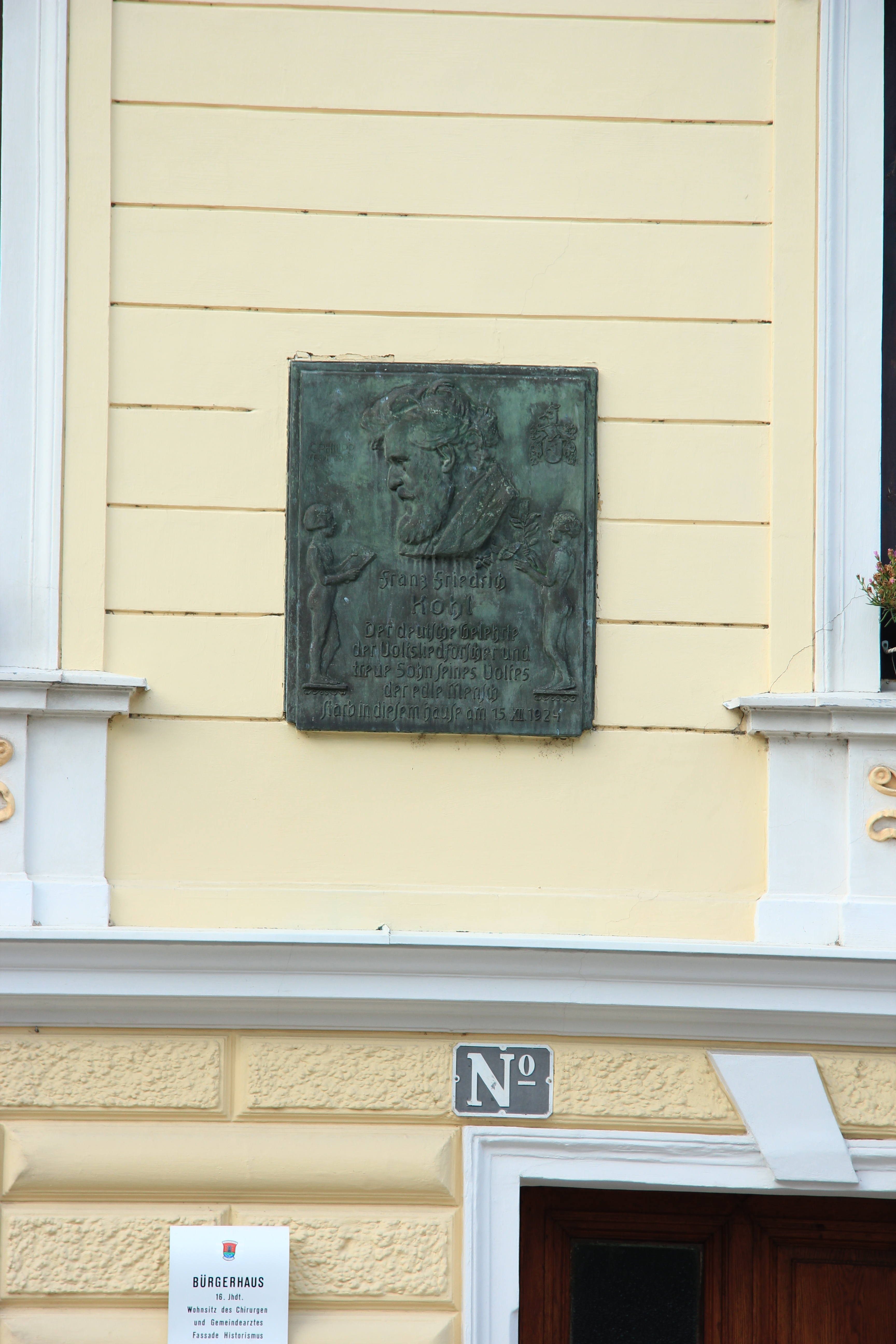 Tafel am Sterbehaus von Franz Friedrich Kohl in Traismauer, Niederösterreich neben Rathaus